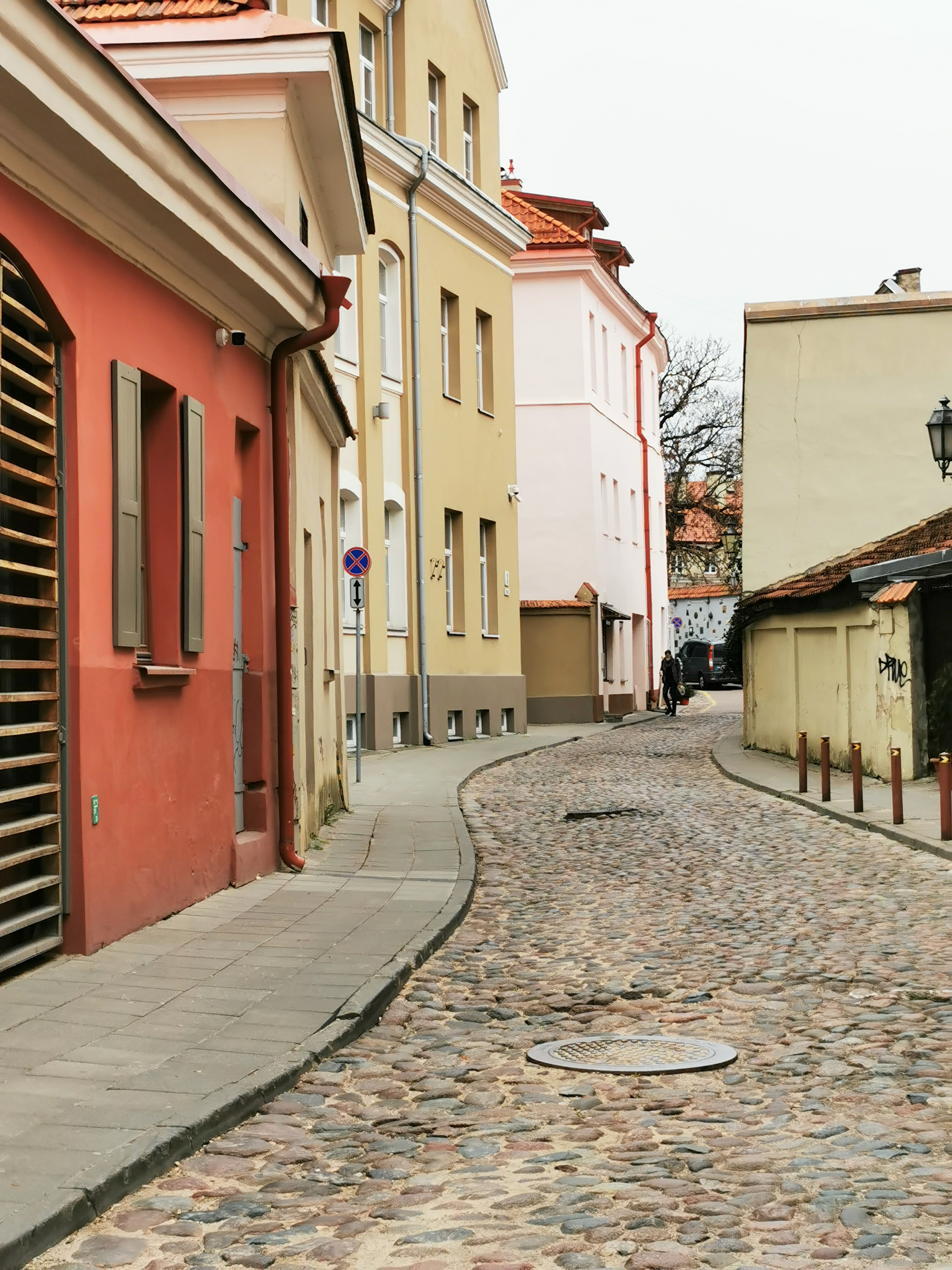 Rusų gatvė